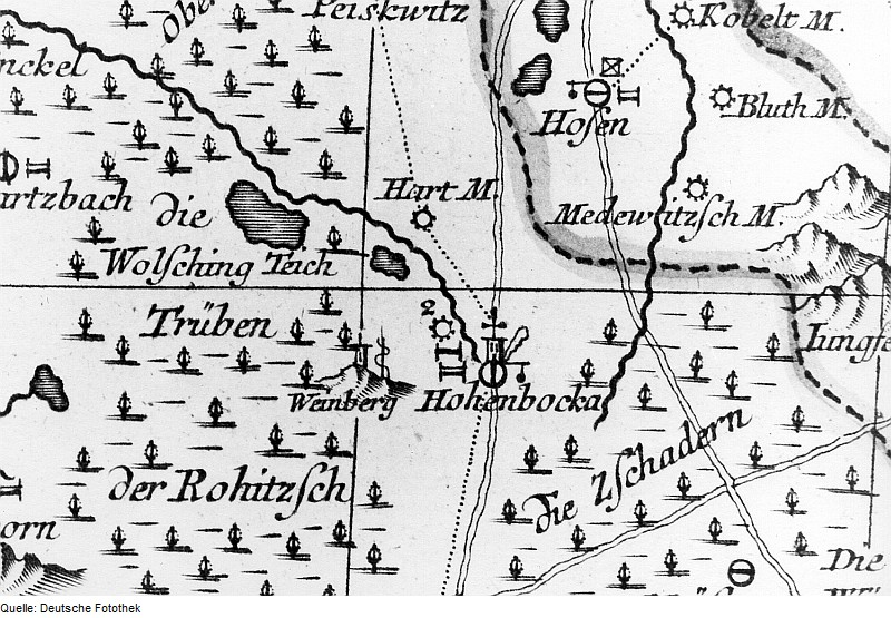 Original image description from the Deutsche Fotothek Hohenbocka. Oberlausitzkarte, Schenk, 1759